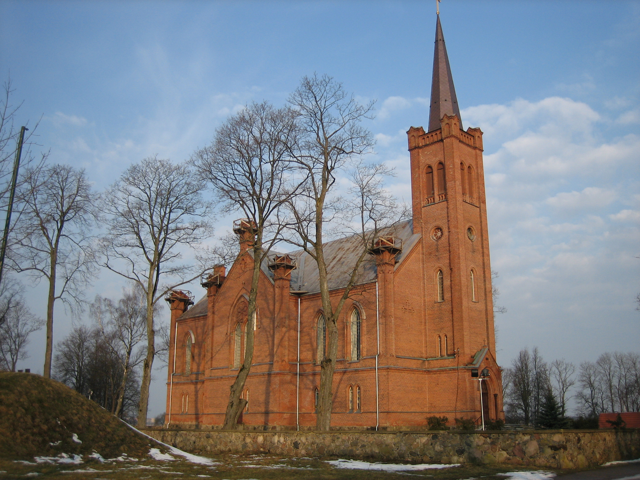 Evangelikų reformatų bažnyčia Biržuose